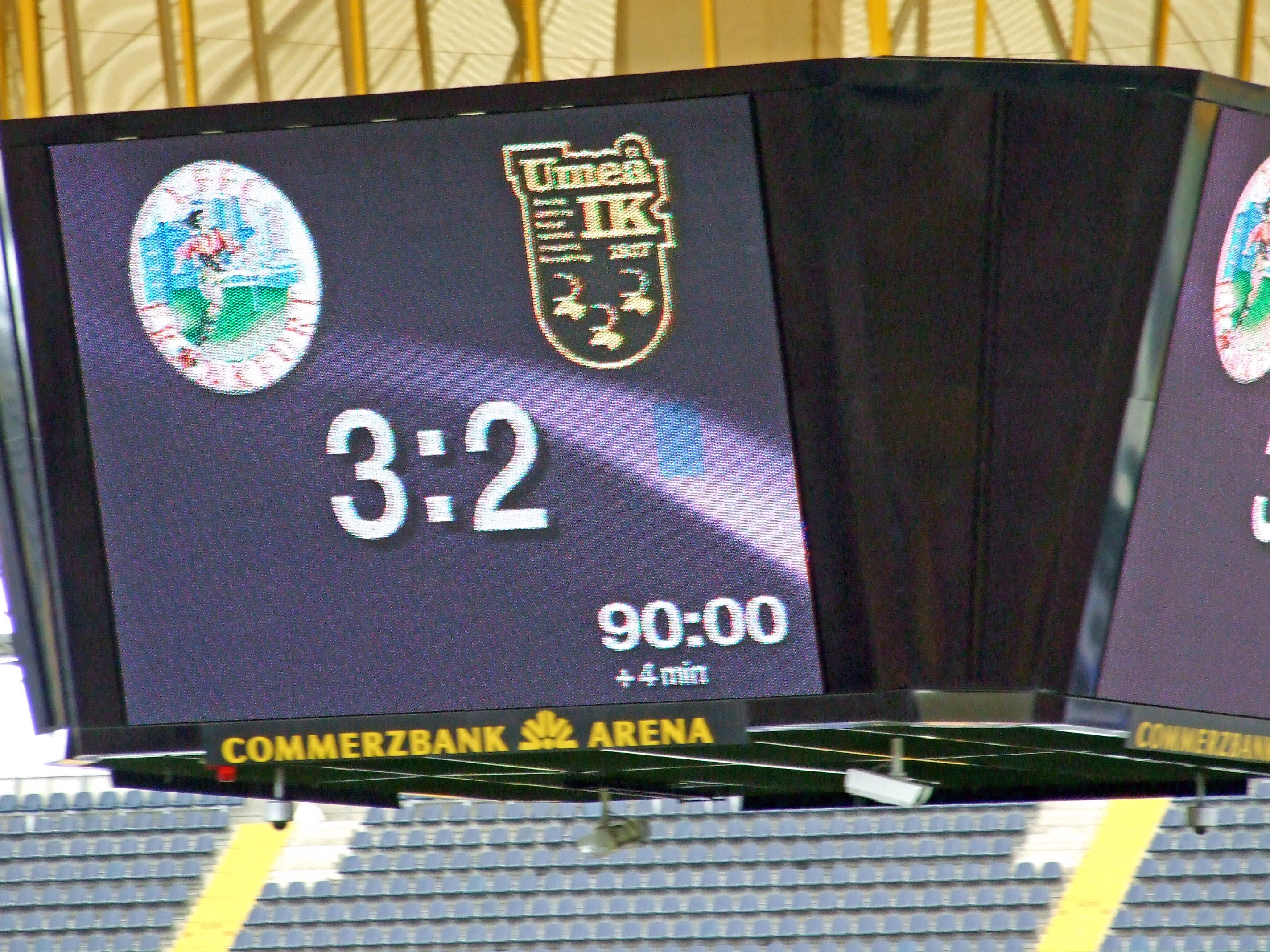 Spielende, 1. FFC gegen Umeå, Commerzbank-Arena bei dem UEFA-Women's-Cup 2007/2008, Finalrückspiel zwischen 1. FFC Frankfurt und Umeå IK damfotboll